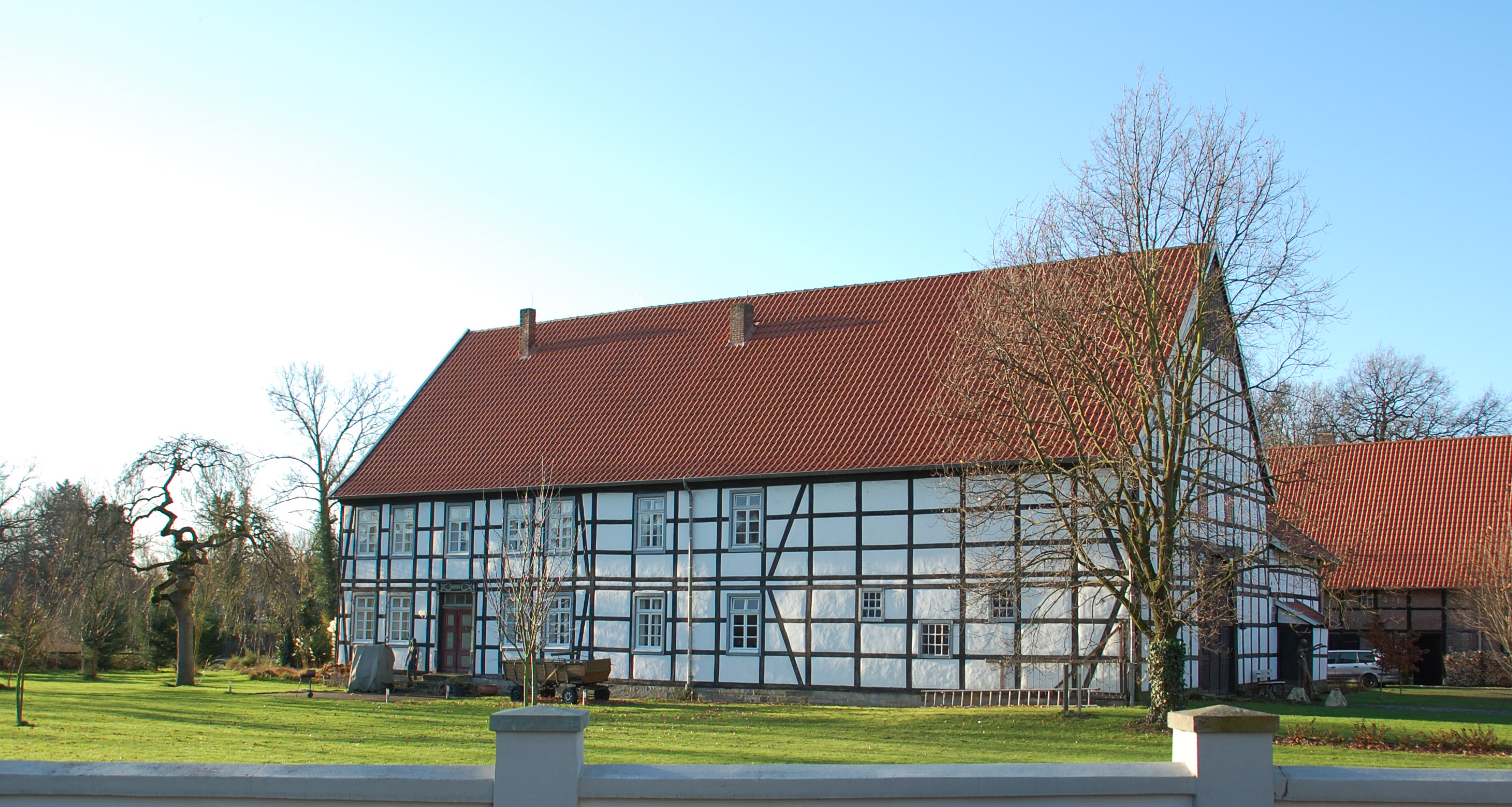 Bauernhaus in Hörste (Hof Nacke, Hörster Straße 144), Lippstadt